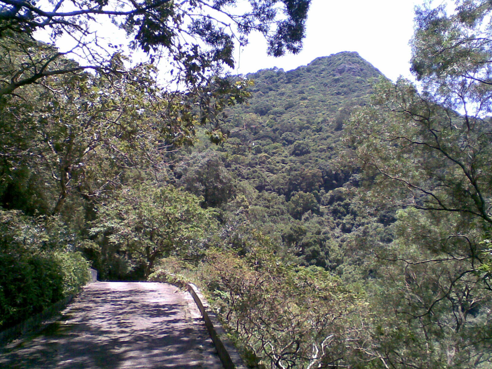 中文（香港）: 觀音山